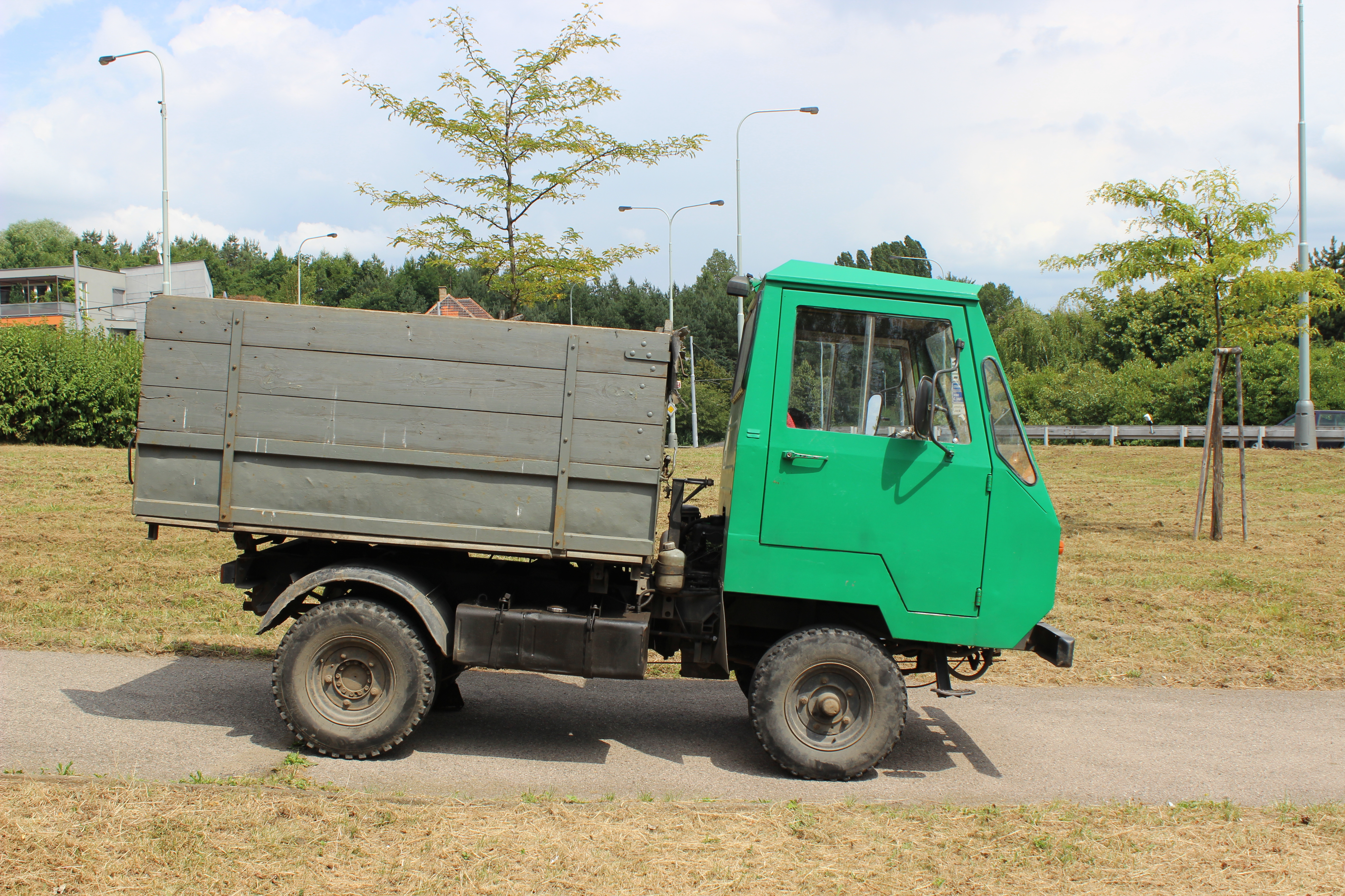 Automobil Multicar M 25 na pražské Vychovatelně.